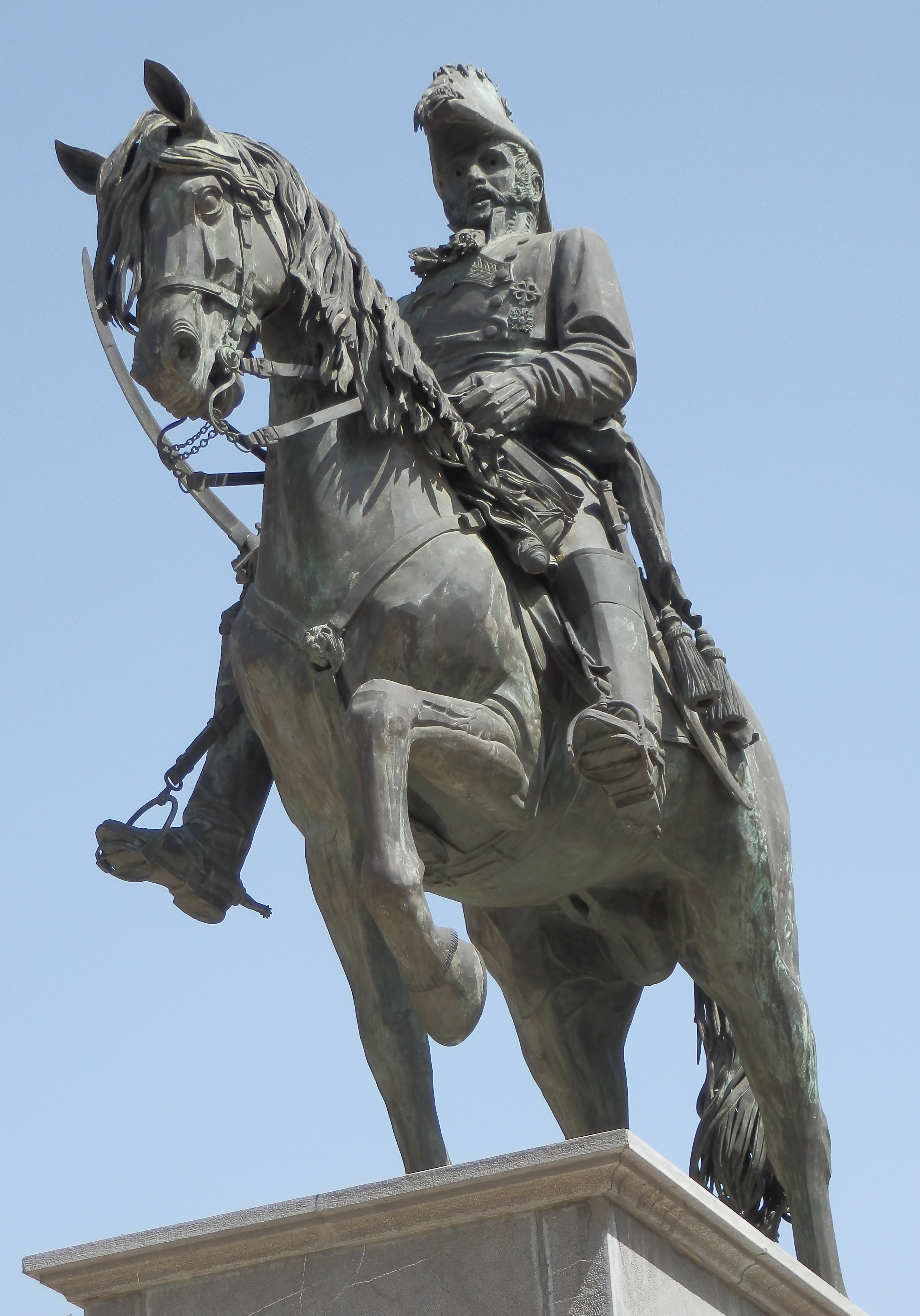 Estatua de José Palafox y Melci en la plaza José María Forqué de Zaragoza, España.